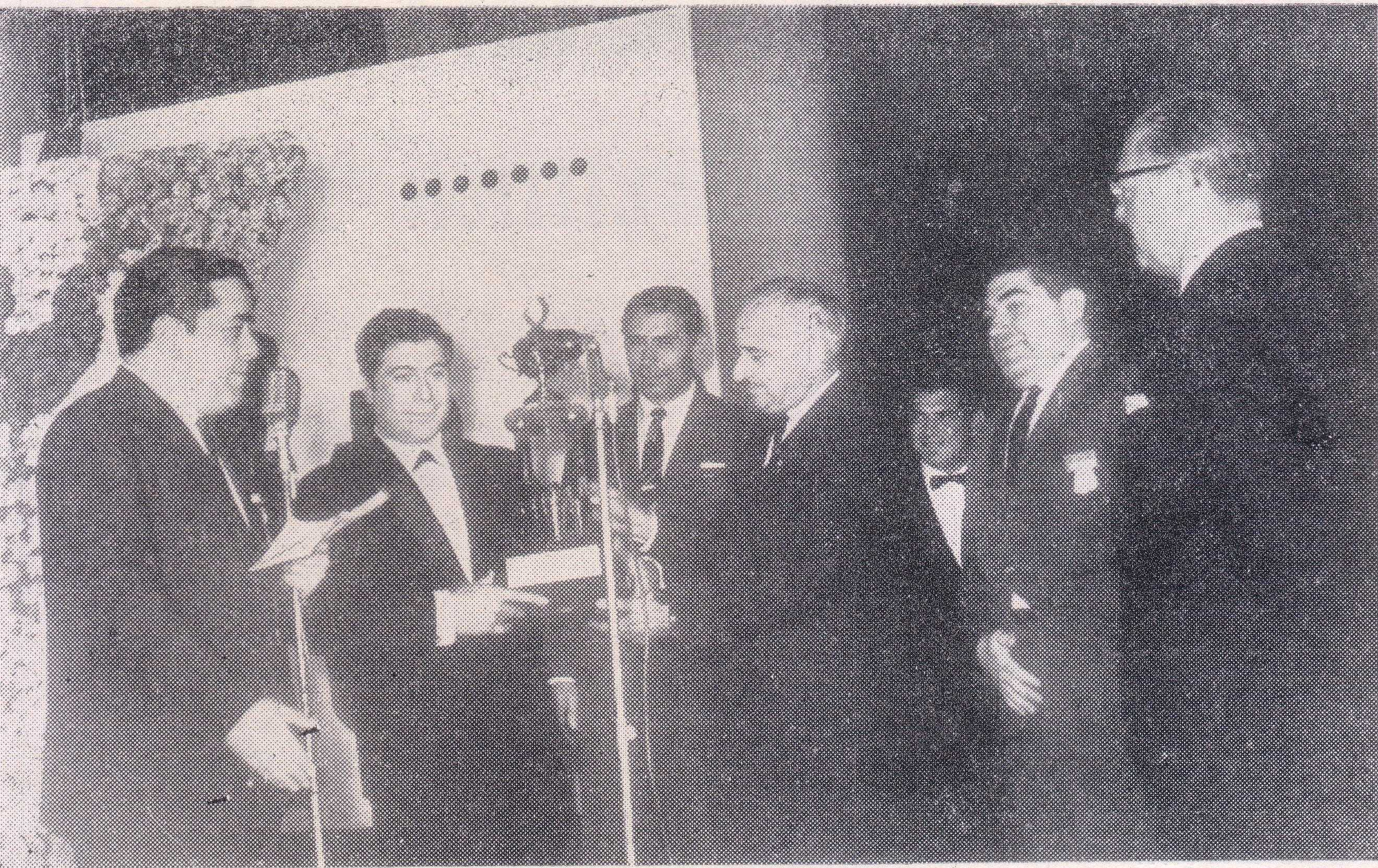 Raul_Echenique_recibiendo_el_trofeo_campeón_ICC_1965